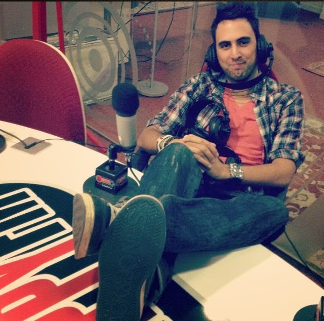 Alex Fidalgo en HappyFM.